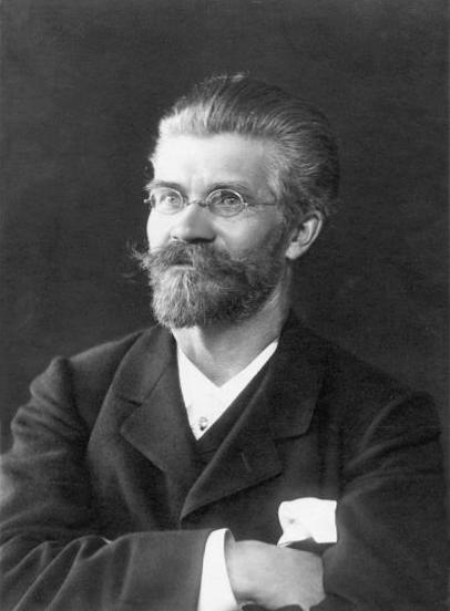 Амандус Генрих Адамсон, скульптор, академик